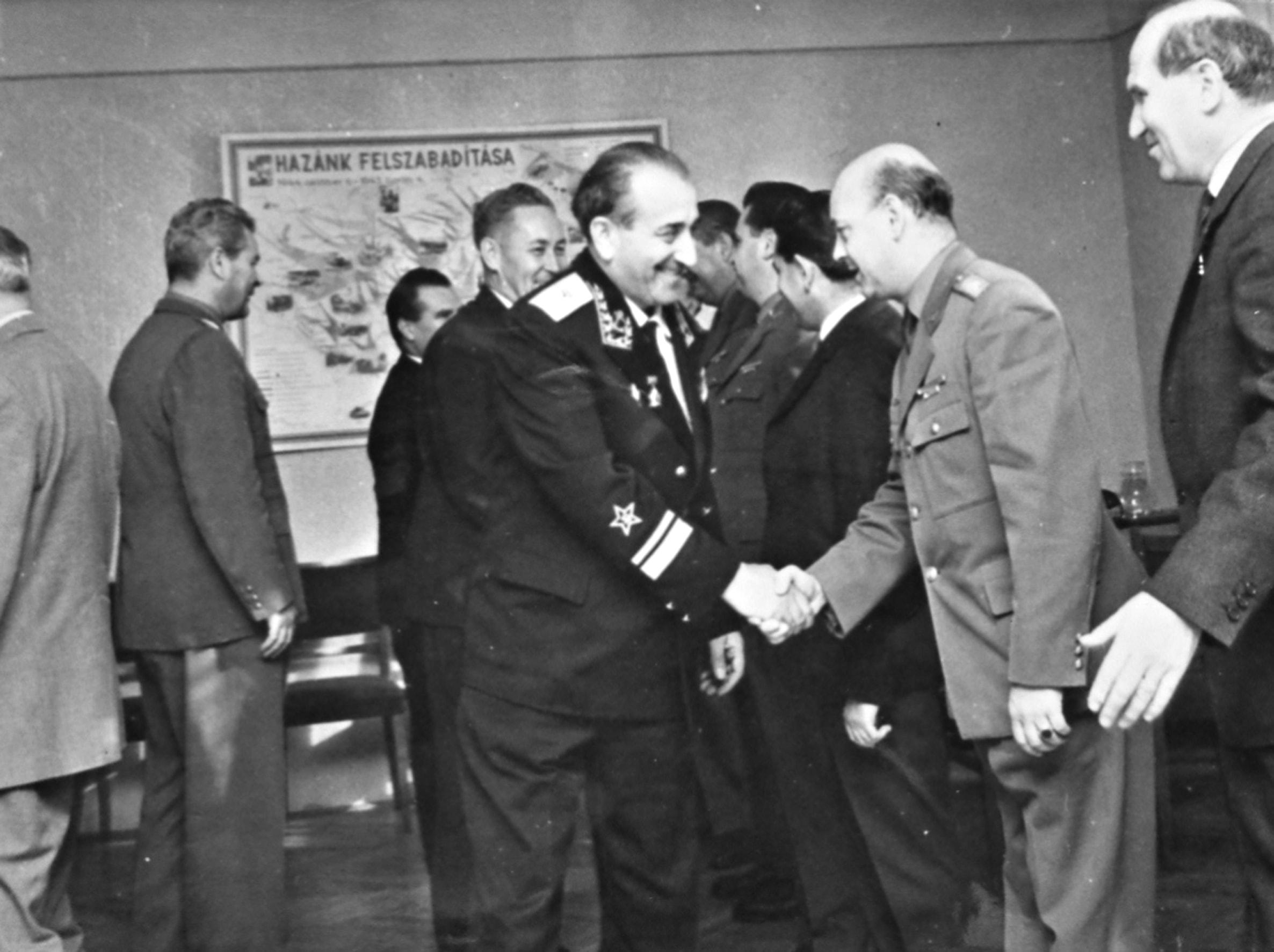 Cəlil Cavadov